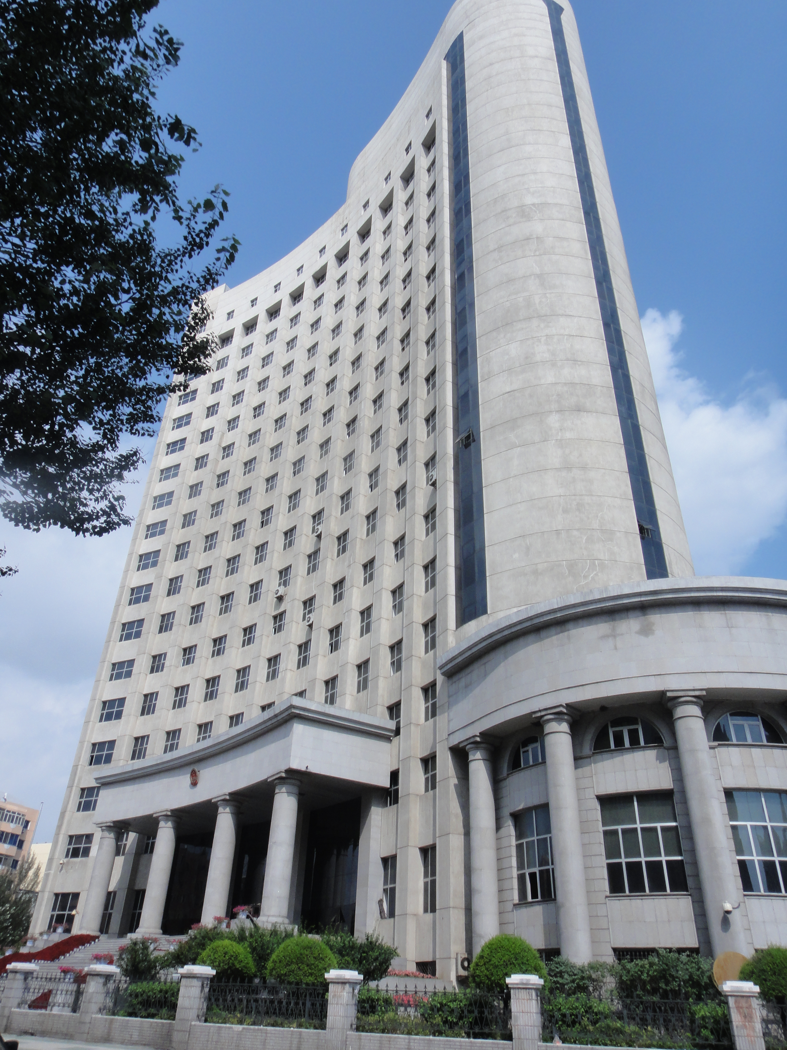 中文（中国大陆）: 哈尔滨市中级人民法院